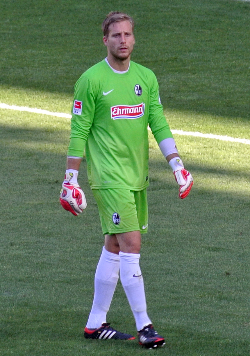 Torwart Oliver Baumann kurz vorm Ende des Saisoneröffnungsspiels von SC Freiburg gegen Athletico Bilbao am 27. Juli 2013